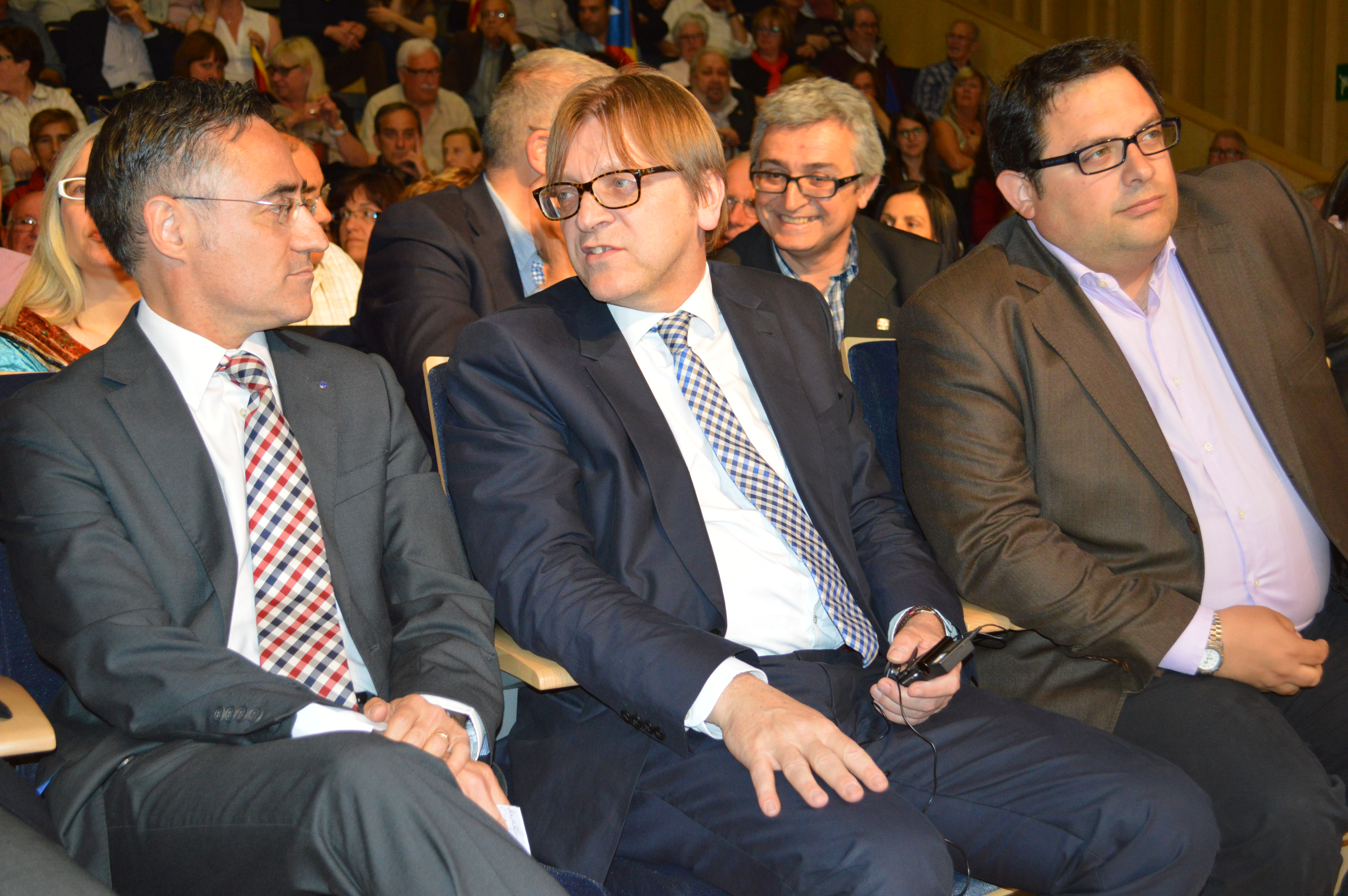 Tremosa, Verhofstadt i Gambús asseguts